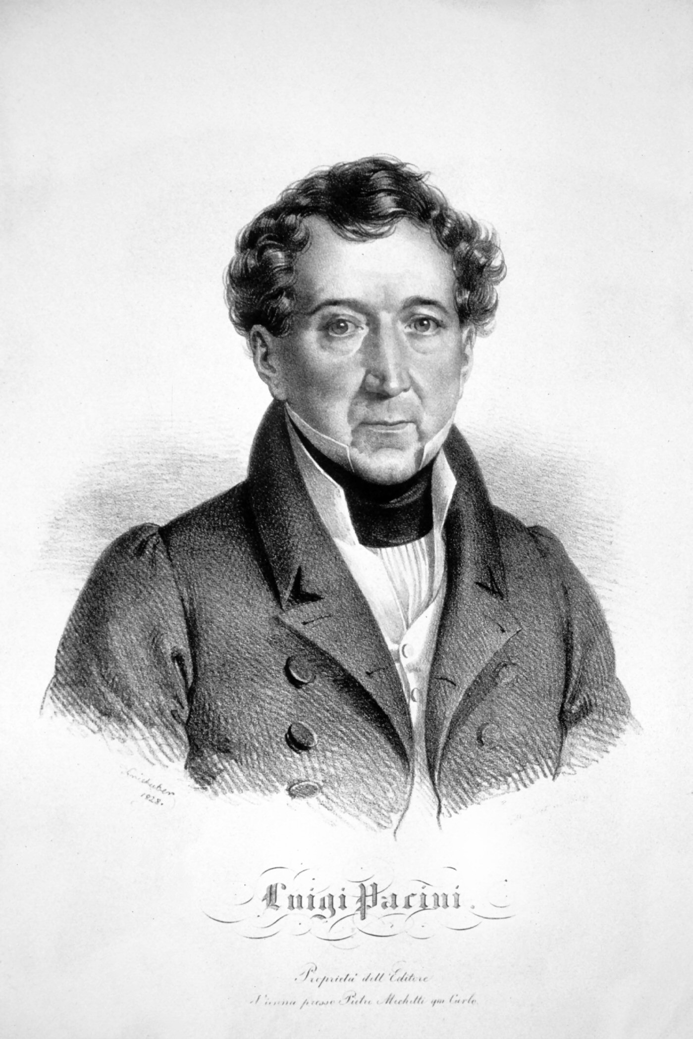 Luigi Pacini (1767-1837), italienischer Sänger (Buffo), Vater des Komponisten Giovanni Pacini